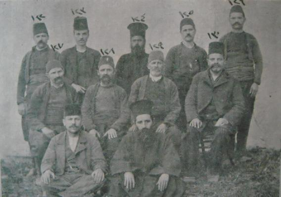 Задържани при Пашмаклийската афера в 1901 година българи в Одринския затвор.